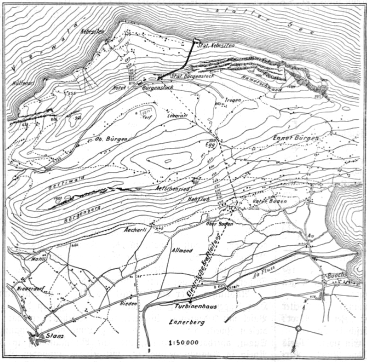 Lageplan der Bürgenstockbahn. Es ist im Besonderen die Übertragungsleitung vom Kraftwerk an der Engelberger Aa bei Buochs über den Bürgenbert zur Bergstation der Bahn zu erkennen